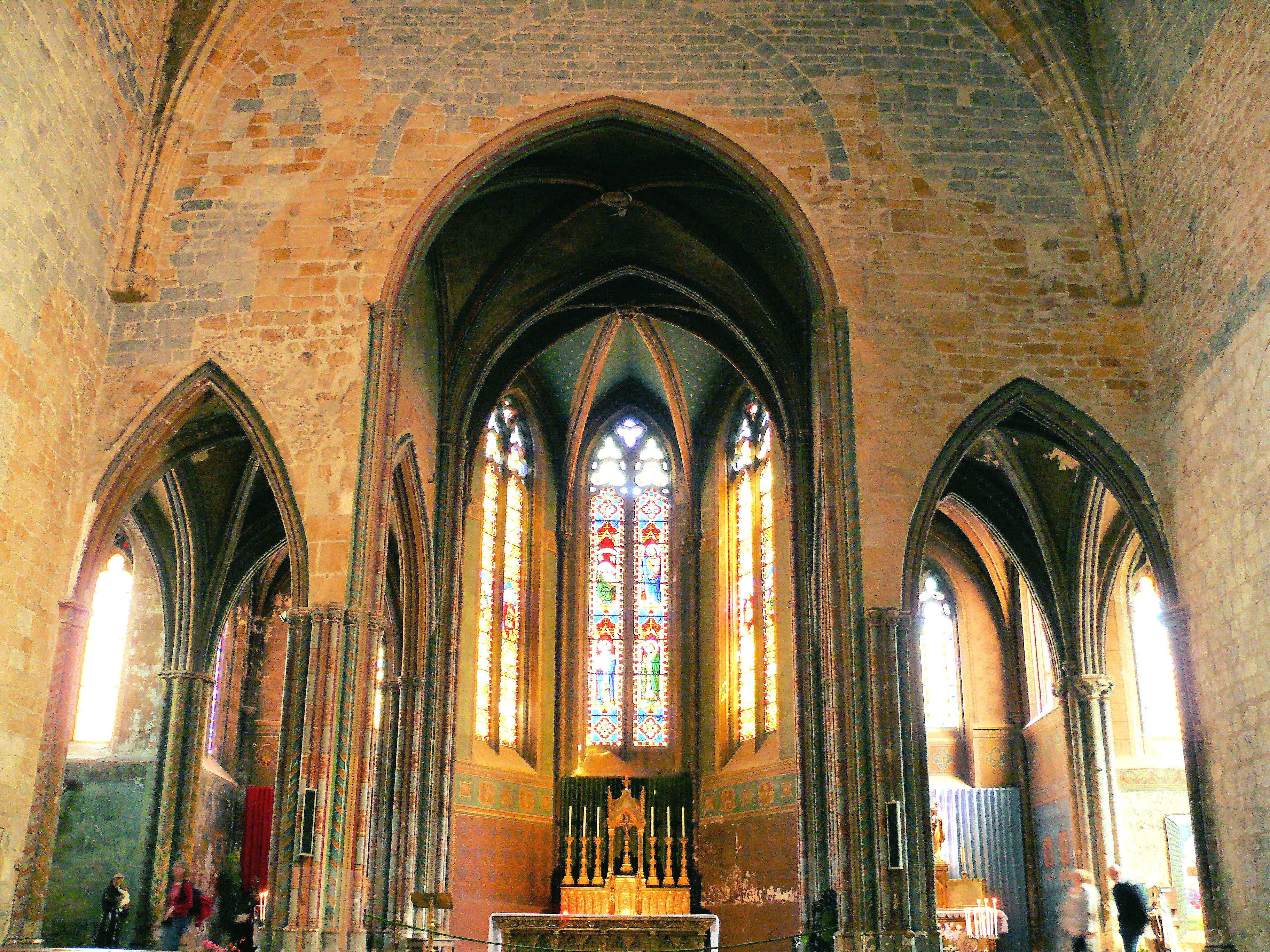 Orthez - Église Saint-Pierre - Choeur, abside et absidioles